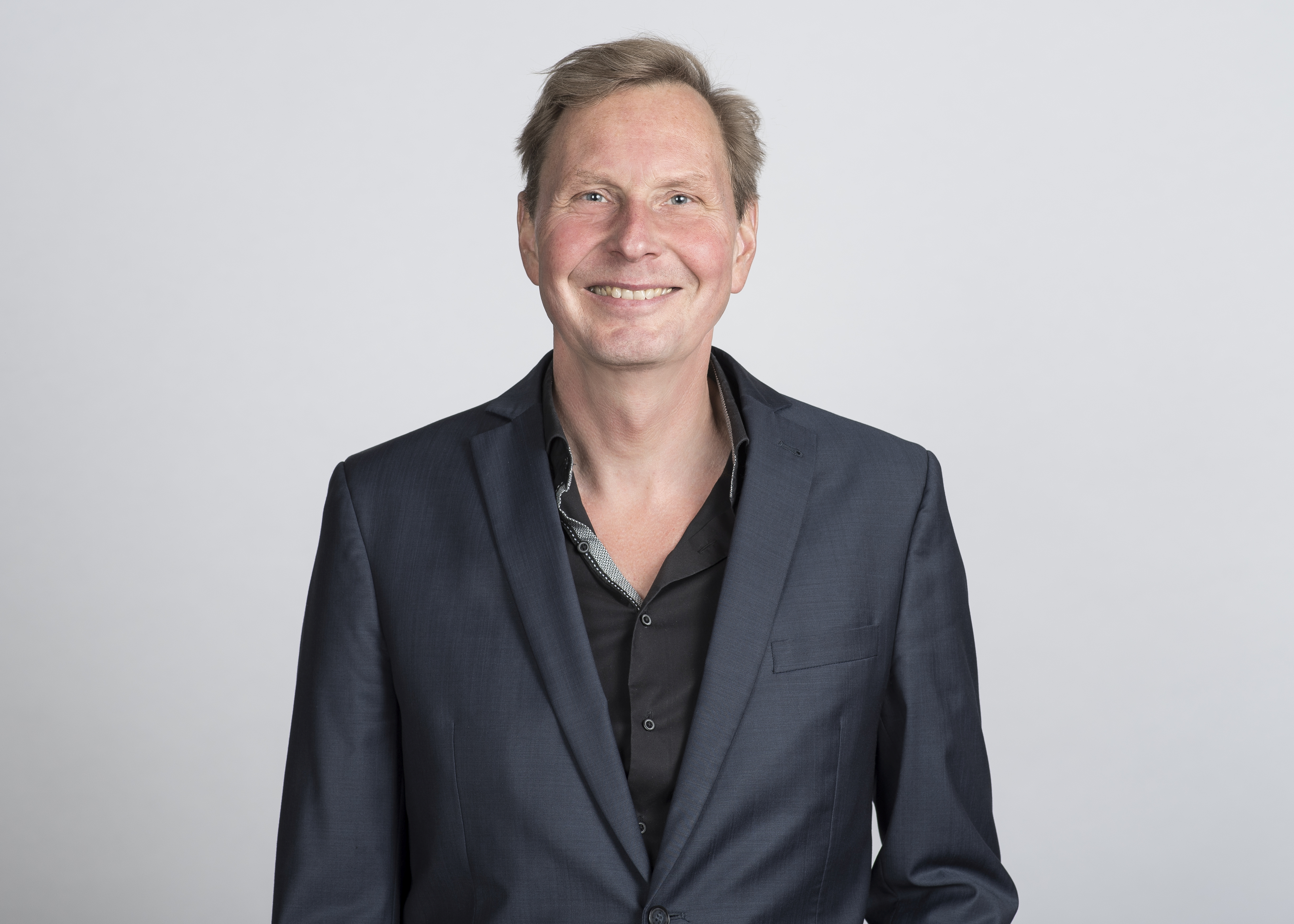 Porträt von Hannes Koch (2018)